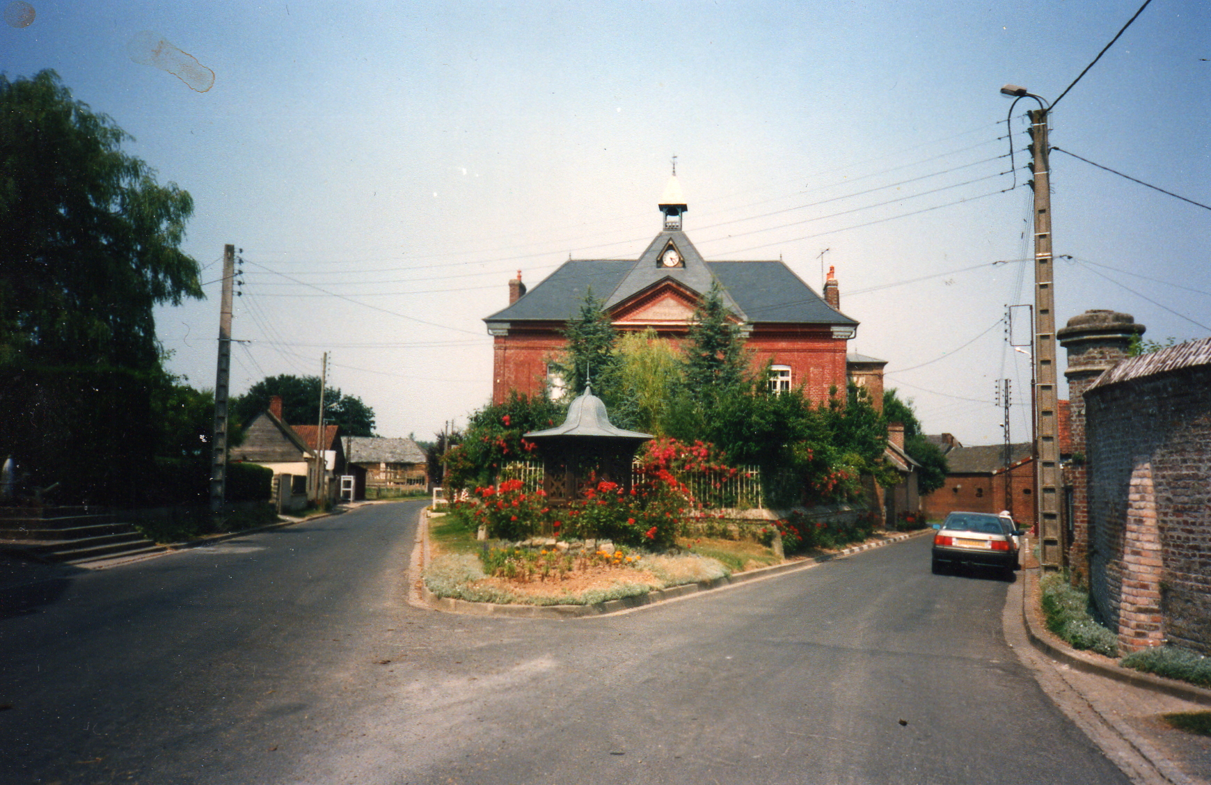 Ramburelles (Somme, France) L'école Delattre (côté sud) avec le vieux puits.